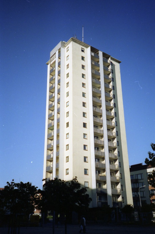 Höghuset vid Axel Dahlströms torg i Göteborg